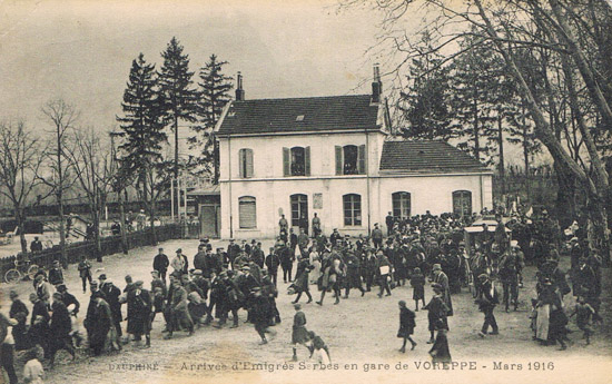 La gare de Voreppe en mars 1916 / Voreppe, Isère, France